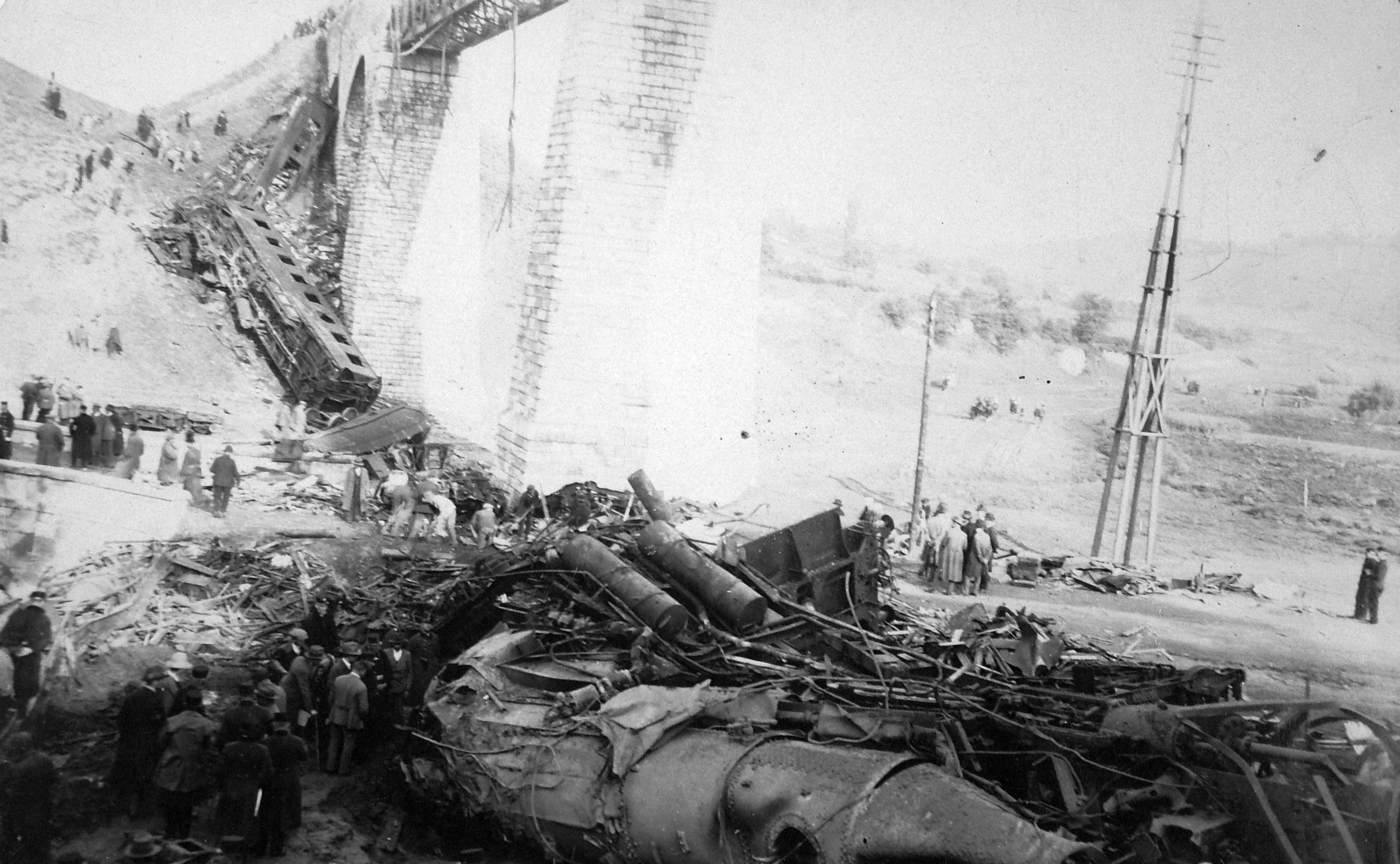 A biatorbágyi vasúti viadukt az 1931. szeptember 13-i merényletet követően